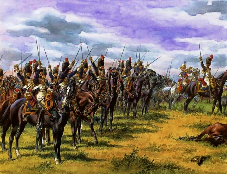 Grenadiers à cheval de la Garde impériale avant la charge.